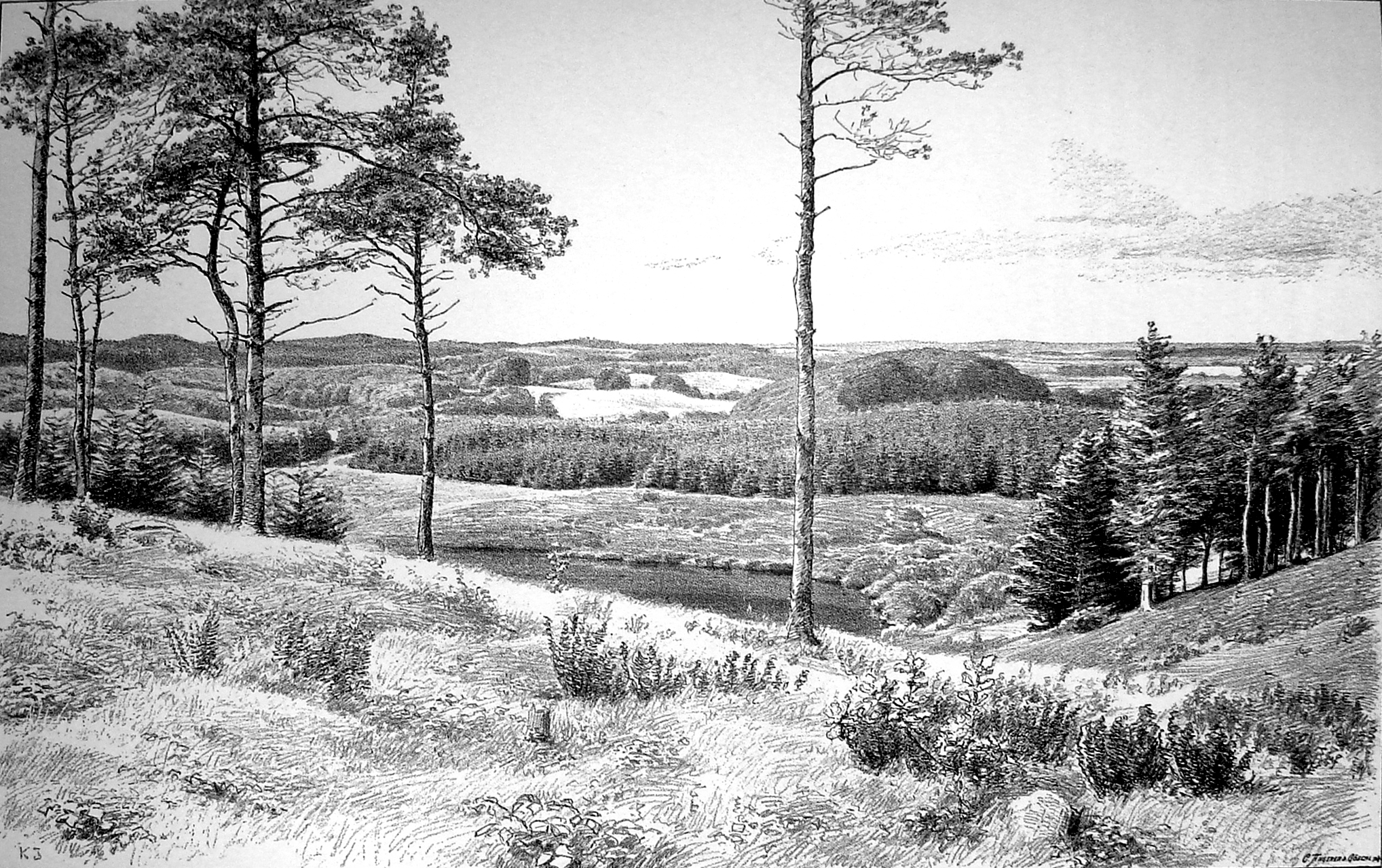 De fynske Alper, eller Svanninge Bakker set fra Holstenhus Dyrehave